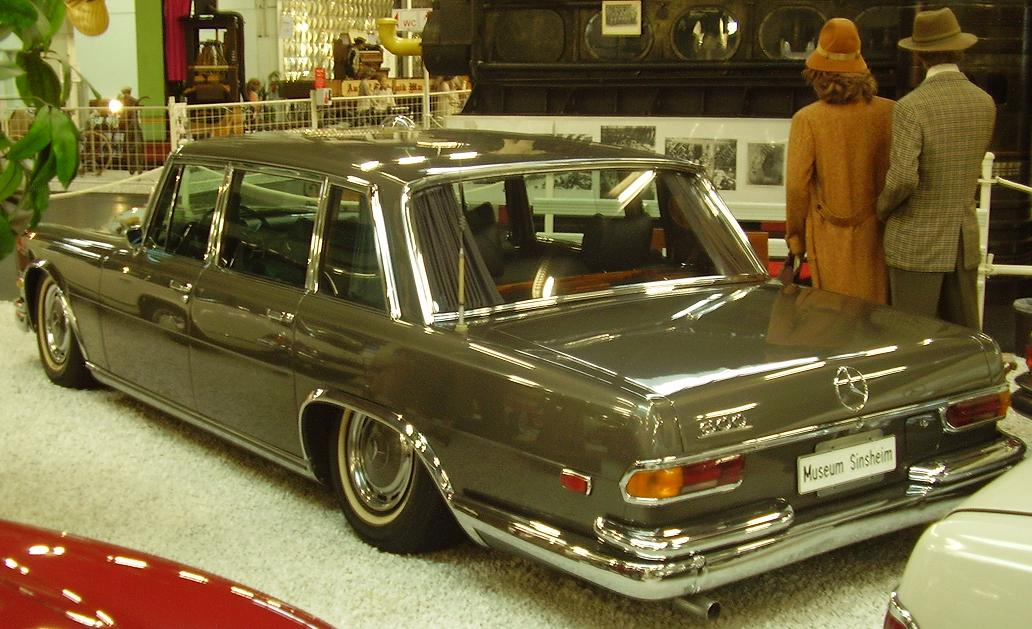 Mercedes-Benz W100 at the Sinsheim Auto & Technik Museum (Sinsheim / Germany)